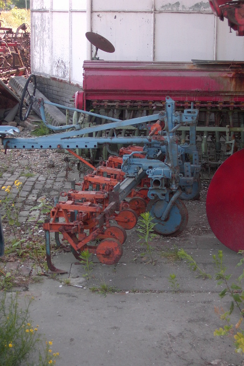 Hackmaschine Schuffelmaschine für Rüben und andere Hackfrüchte